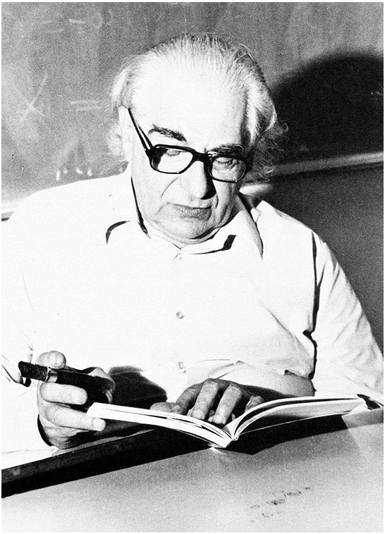 Mário Schenberg (1914-1990), físico, político e crítico de arte brasileiro